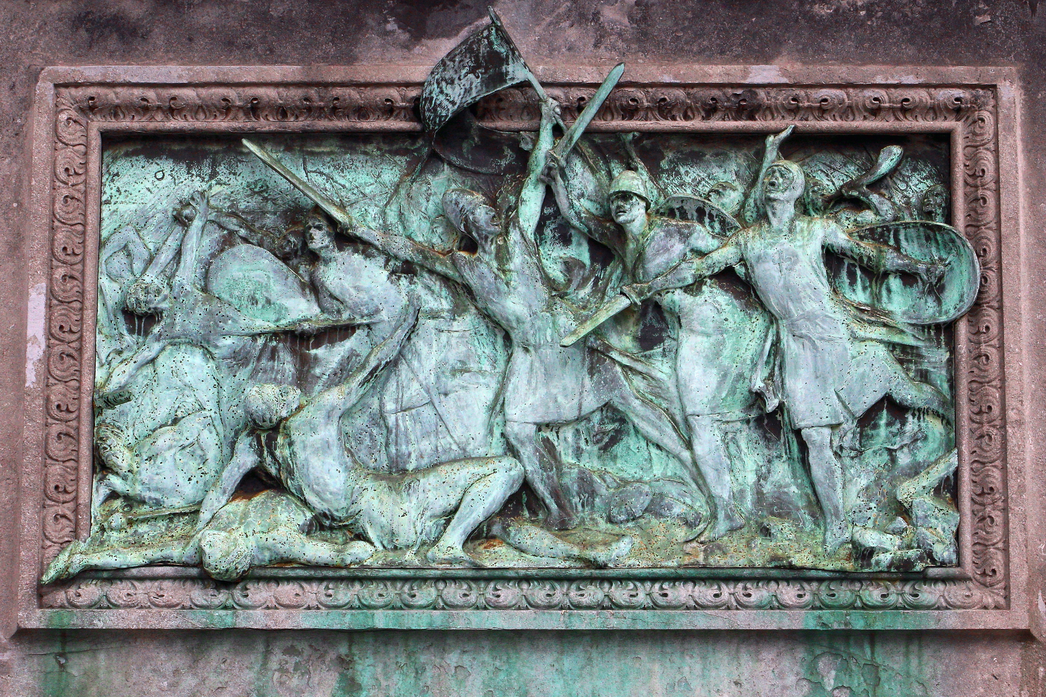 Statue équestre de Godefroid de Bouillon, place Royale, bruxelles, Belgique. Détail : bas-relief de G. De Groot (1897), représentant l'Assaut de Jérusalem